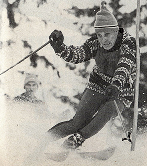 Bengt-Erik Grahn